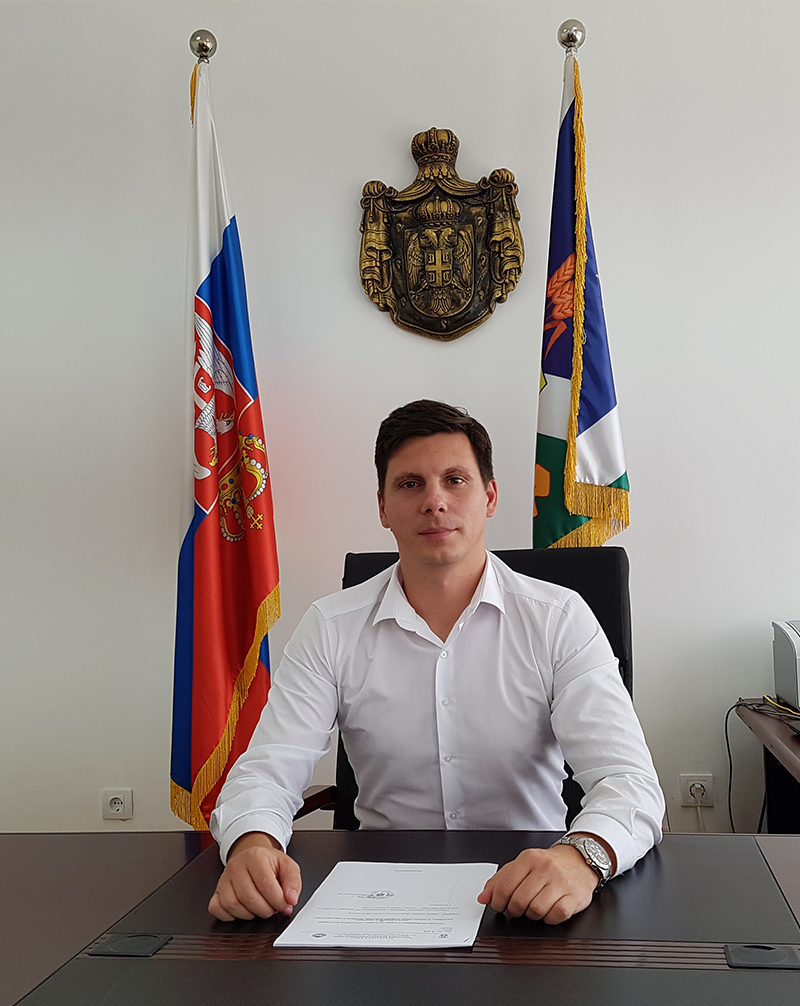 Фотографија